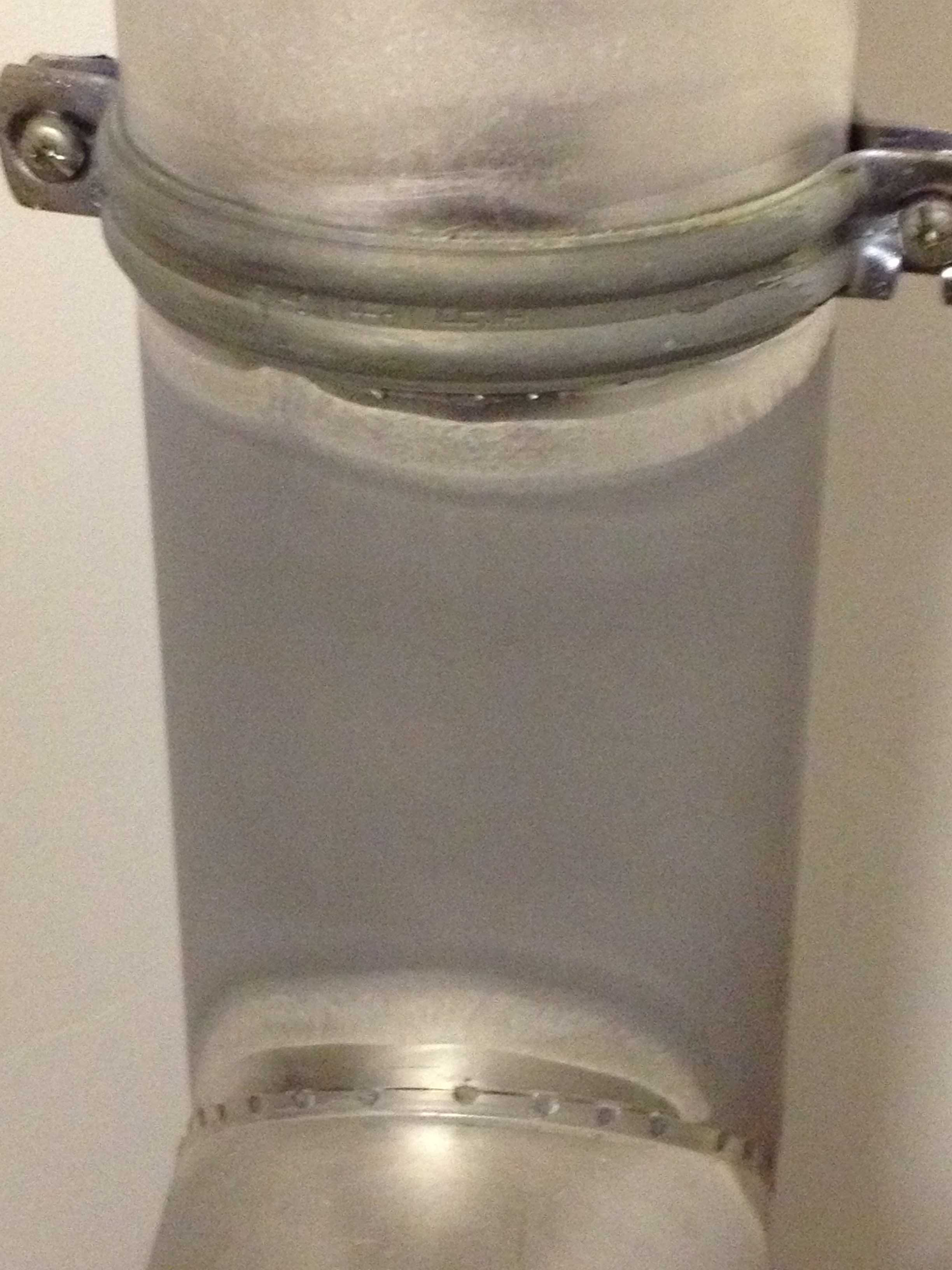 Aluminisiertes Ofenrohr, an der Stelle der höchsten Betriebstemperatur zeigt sich die chemische Reaktion von Eisen (Stahl) mit Aluminium.